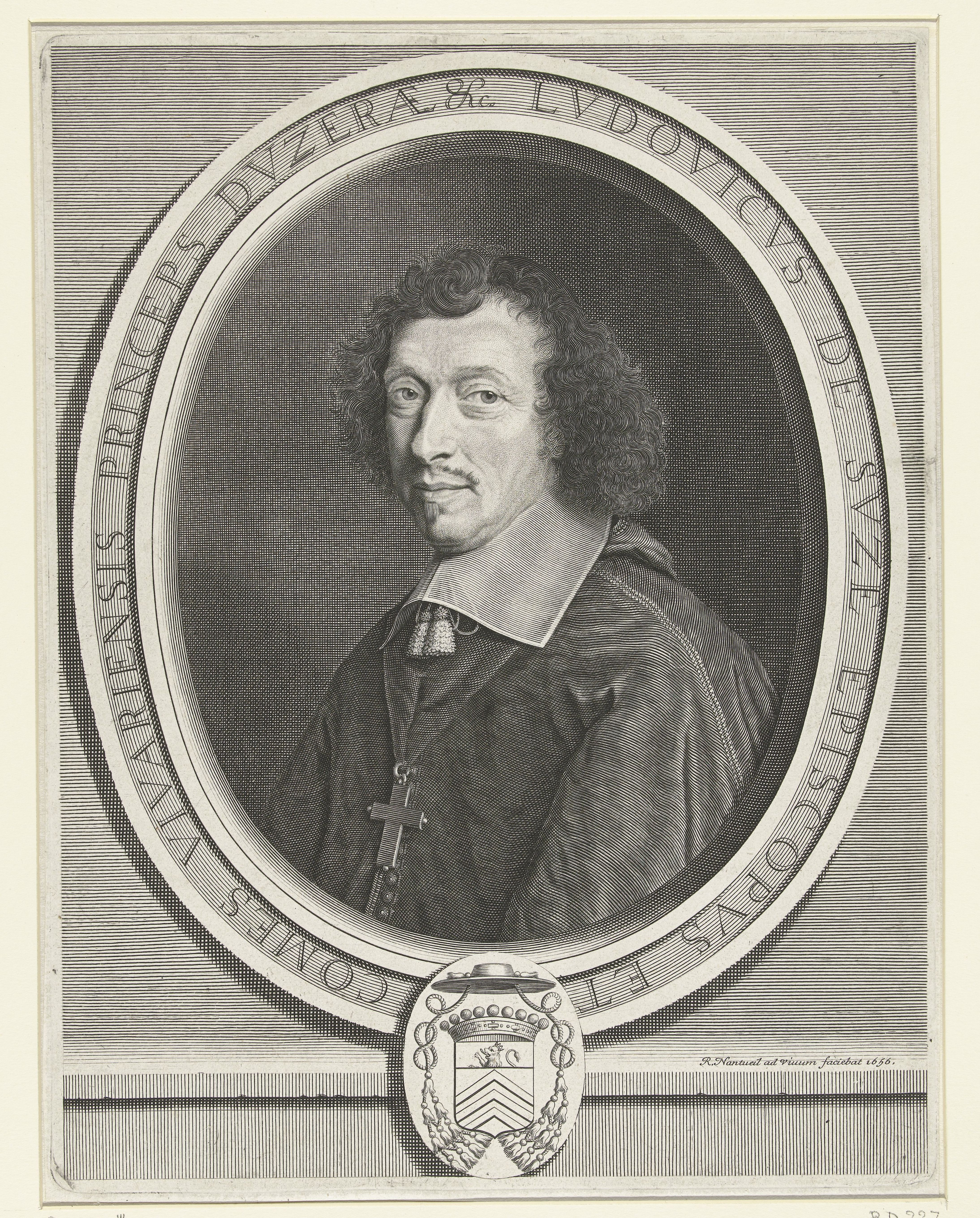 IdentificatieTitel(s): Portret van Louis-François de la Baume de SuzeObjecttype: prent Objectnummer: RP-P-OB-21.247Catalogusreferentie: Robert-Dumesnil 227-1(3)Petitjean & Wickert 213-3(4)Opschriften / Merken: verzamelaarsmerk, verso linksonder, gestempeld: Lugt 2228Omschrijving: Portret van de bisschop Louis-François de la Baume de Suze, in een ovale omlijsting met tekst. Onderaan een wapenschild.VervaardigingVervaardiger: prentmaker: Robert Nanteuil (vermeld op object)naar eigen ontwerp van: Robert NanteuilPlaats vervaardiging: FrankrijkDatering: 1656Fysieke kenmerken: gravureMateriaal: papier Techniek: graveren (drukprocedé)Afmetingen: plaatrand: h 325 mm × b 250 mmOnderwerpWie: Louis-François de la Baume de SuzeVerwerving en rechtenVerwerving: onbekend 1994Copyright: Publiek domein